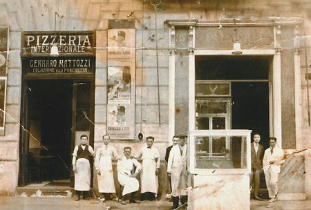 I Mattozzi davanti al loro locale di Via Depretis in 1910 circa, Napoli – Italia.